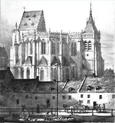 Collégiale Saint-Pierre de Lille